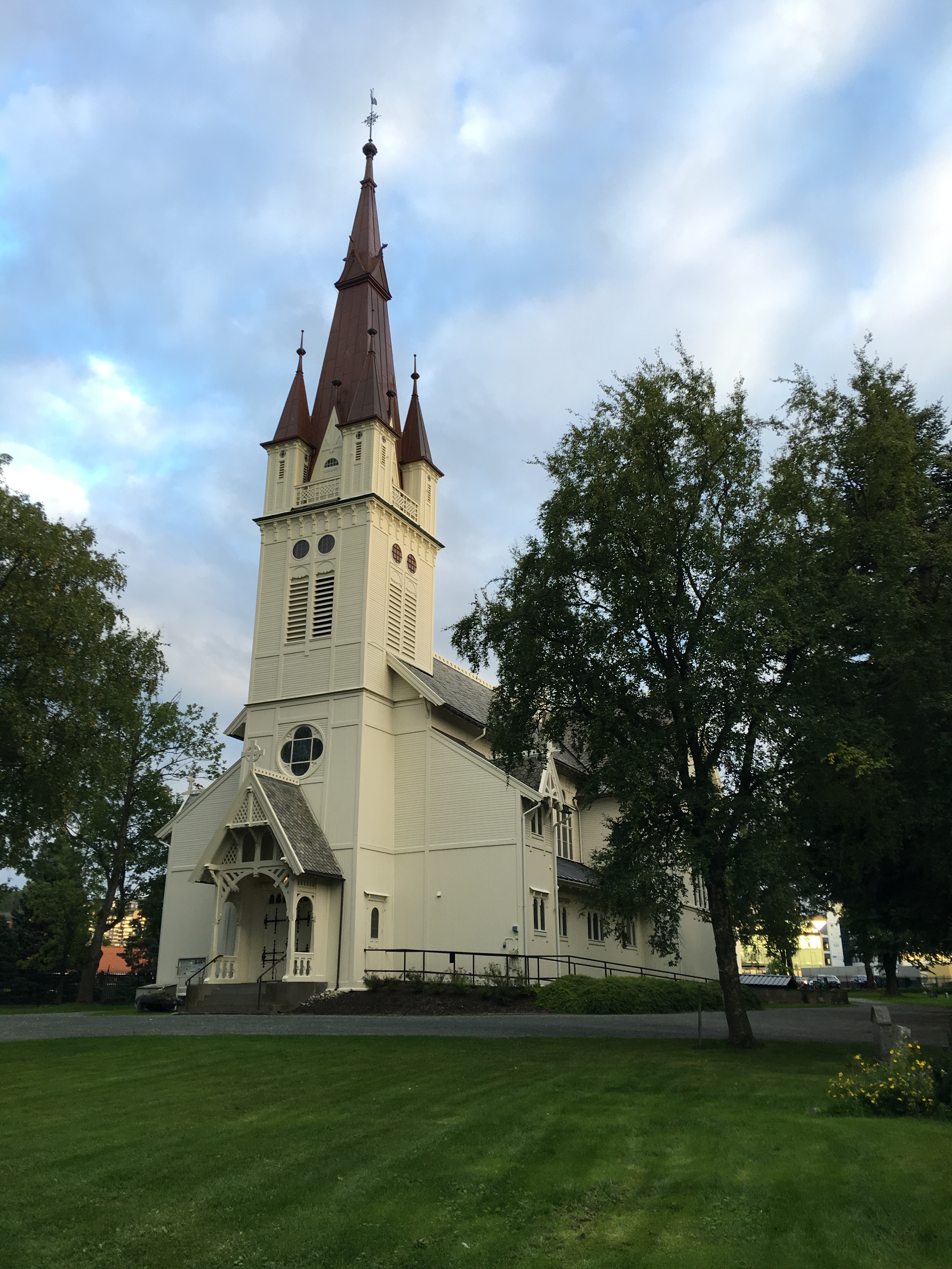 Strinda kirke sett fra nord.